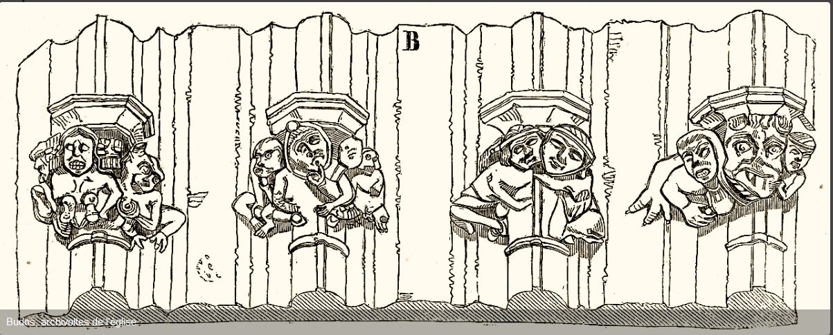 Budos église naissance des archivoltes portail (Drouyn 1847)